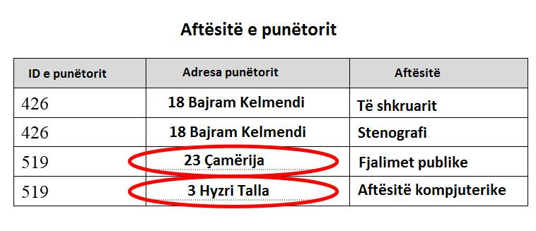 Modifikimi